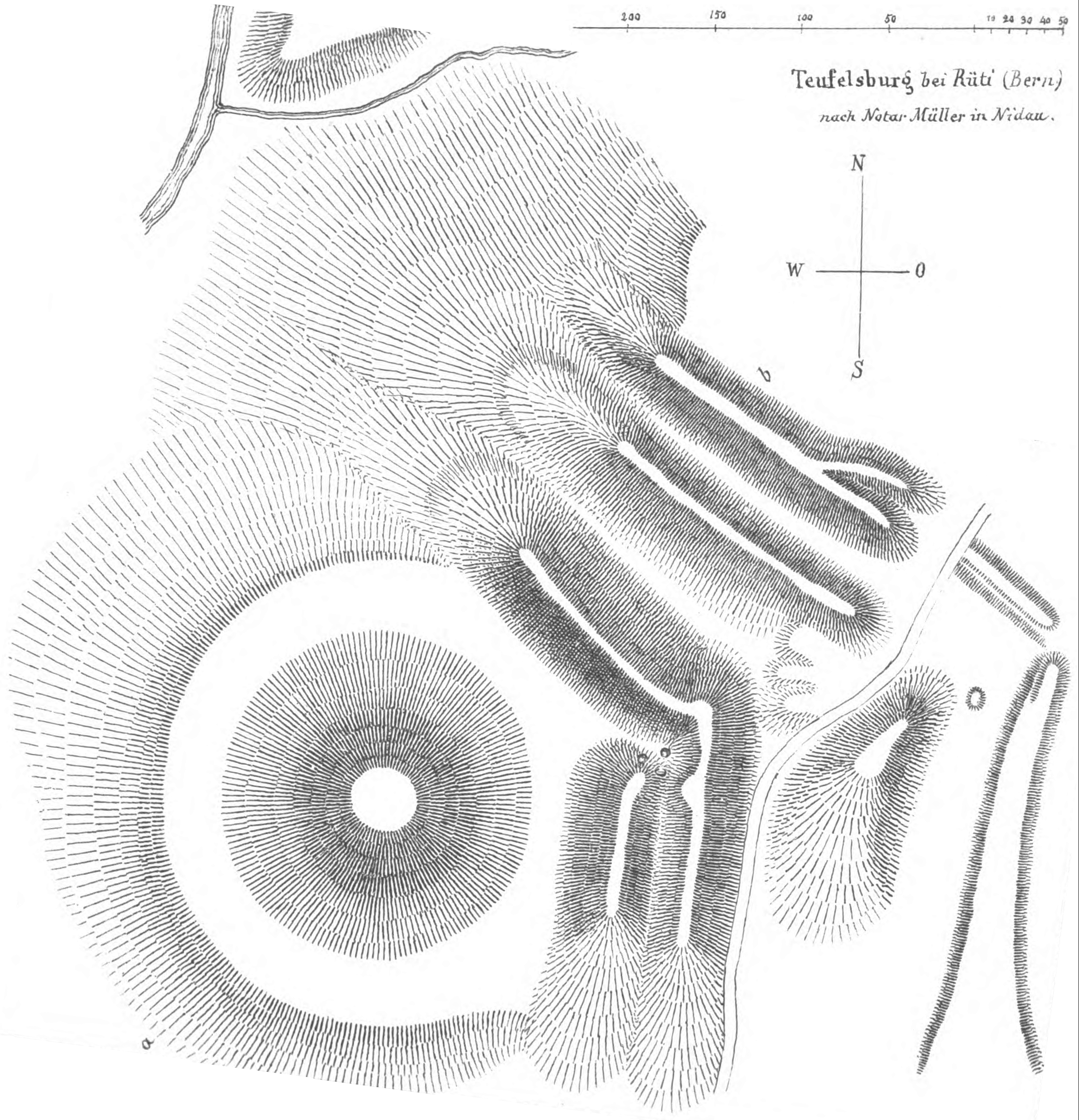 Grundriss-Skizze der Teufelsburg im Rütiwald, Gemeinde Rüti bei Büren (Kanton Bern, Schweiz). Mottenburg mit Erdwällen und Gräben des 10./11. Jahrhunderts. Bearbeitung: nach Norden gedreht; beschnitten. Massstab: Fuss (nicht-metrisch).